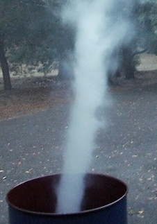 experimental vortex